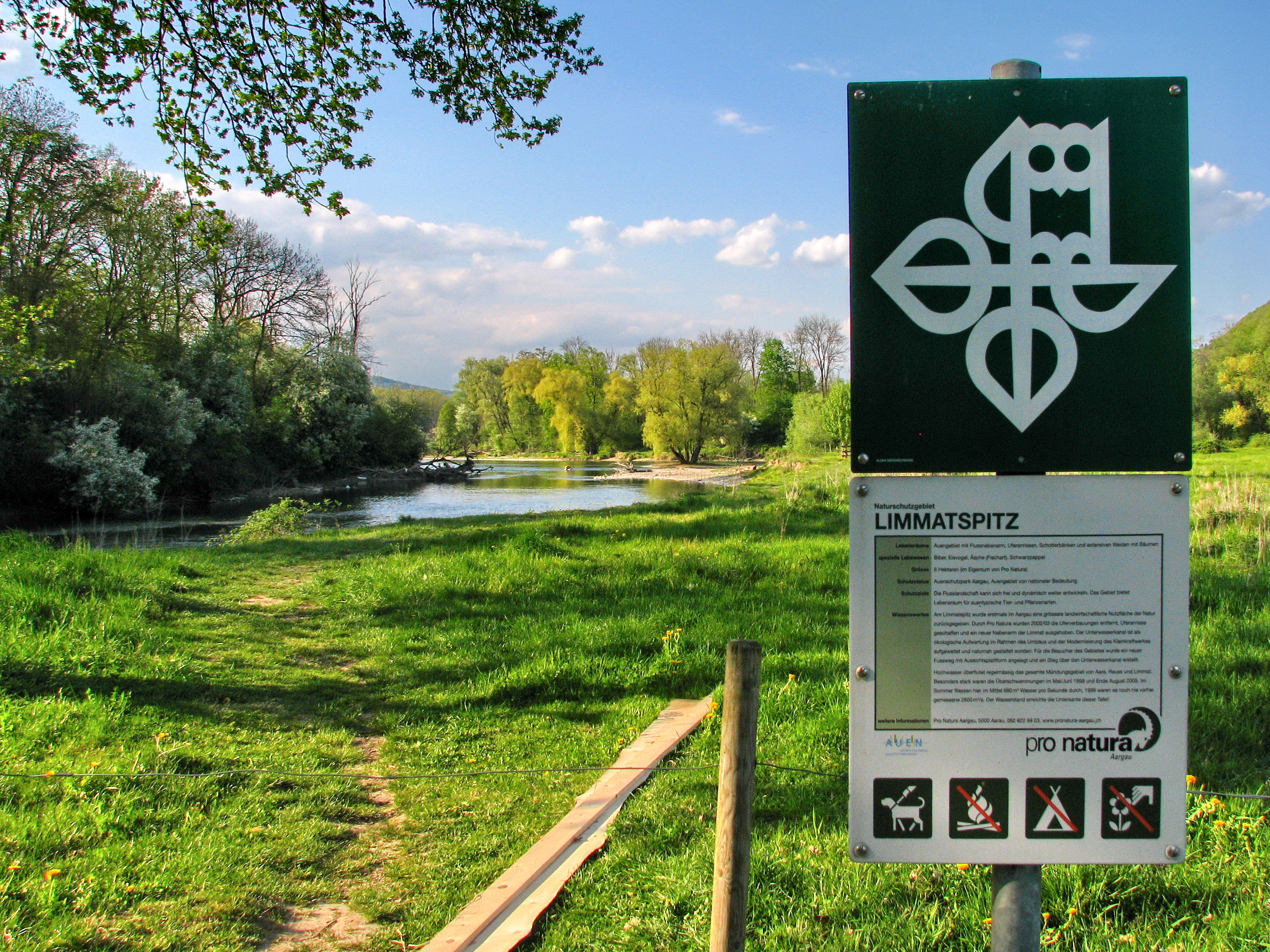 Limmatspitz protected area in Vogelsang (Gebenstorf)